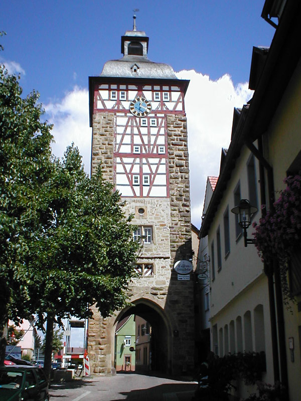 Köllesturm in Bönnigheim, ehemaliger Torturm der mittelalterlichen Stadtbefestigung